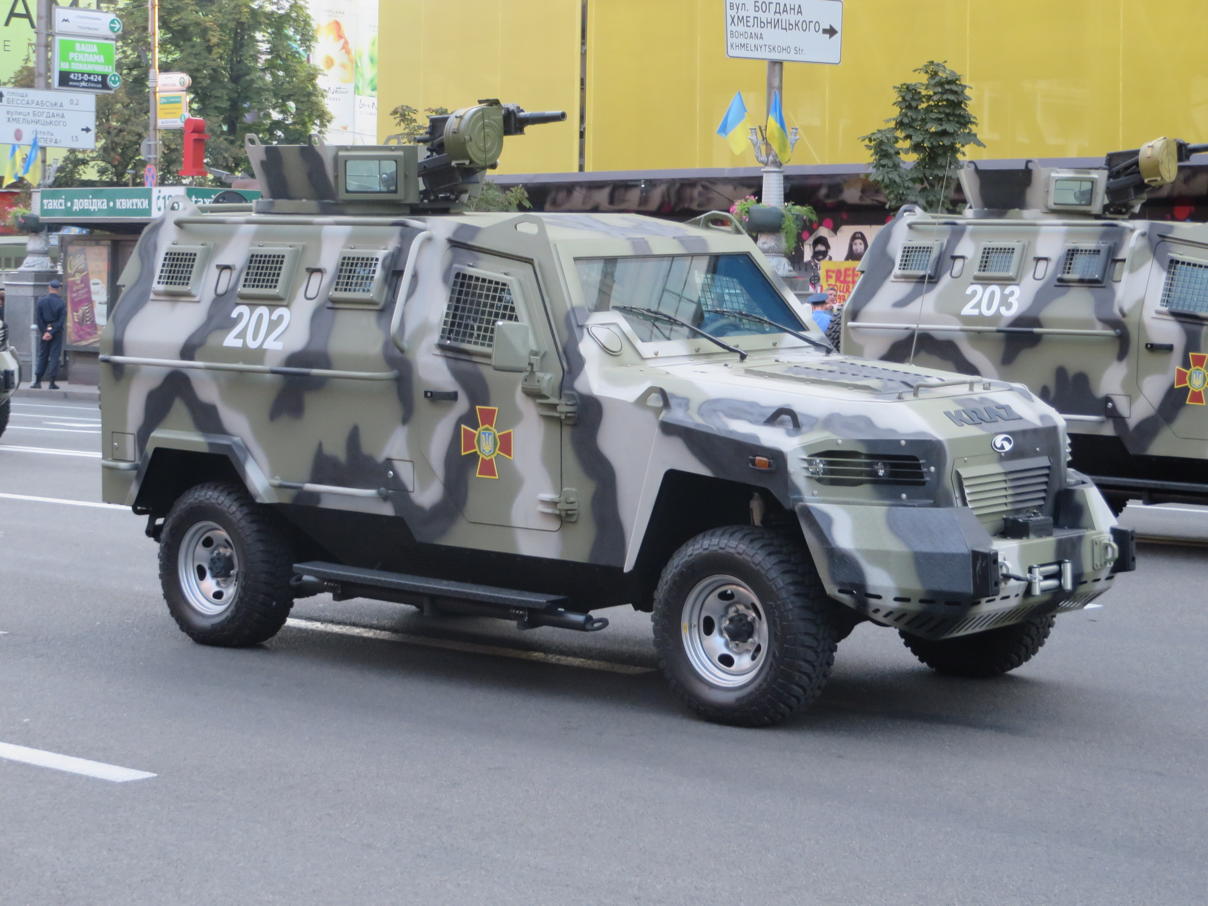 Українські броньовики KRAZ Cougar під час тренувального маршу перед парадом на День незалежності, 22 серпня 2014 року, Київ, Україна.